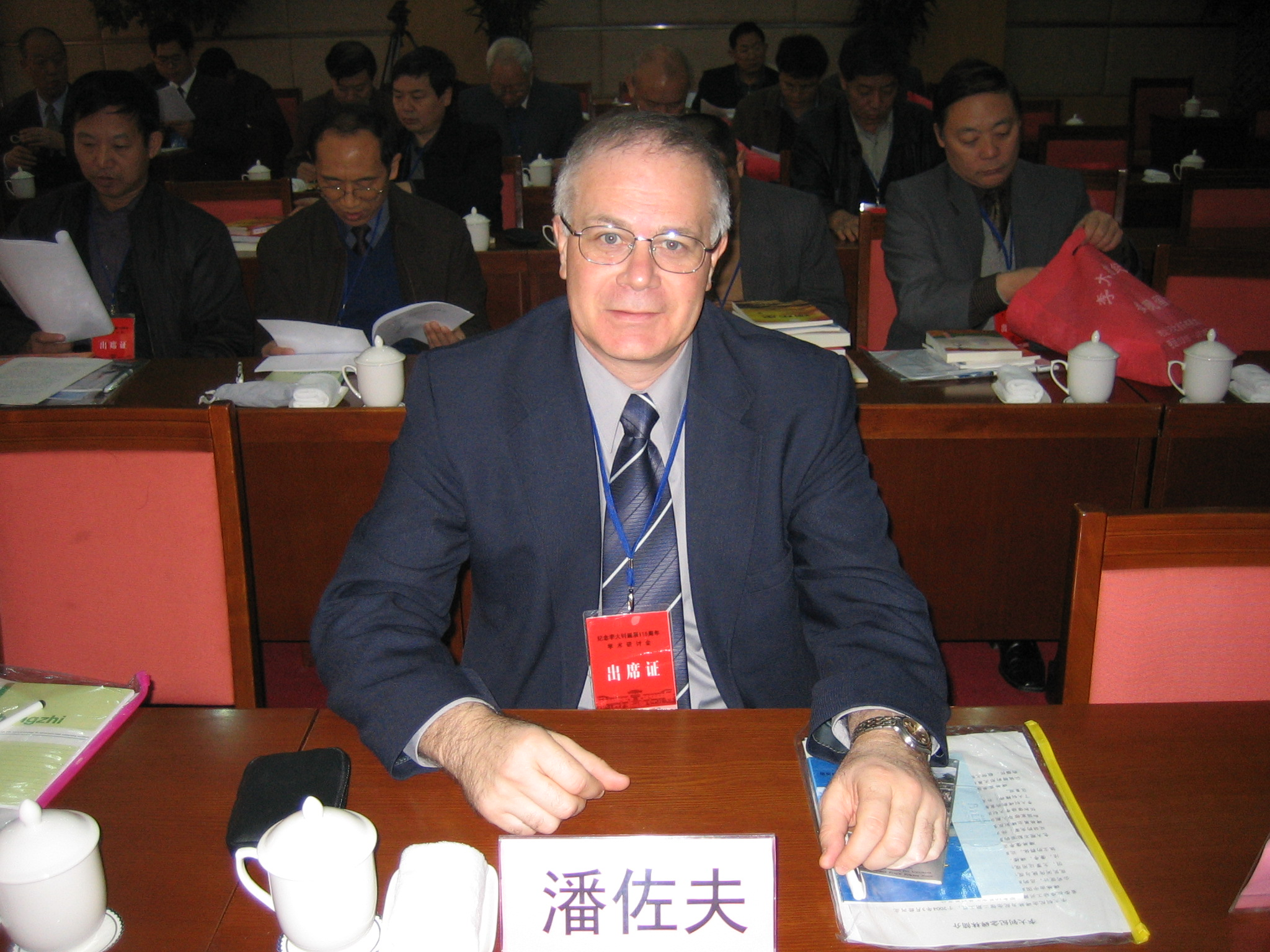 русский и американский синолог Александр Панцов